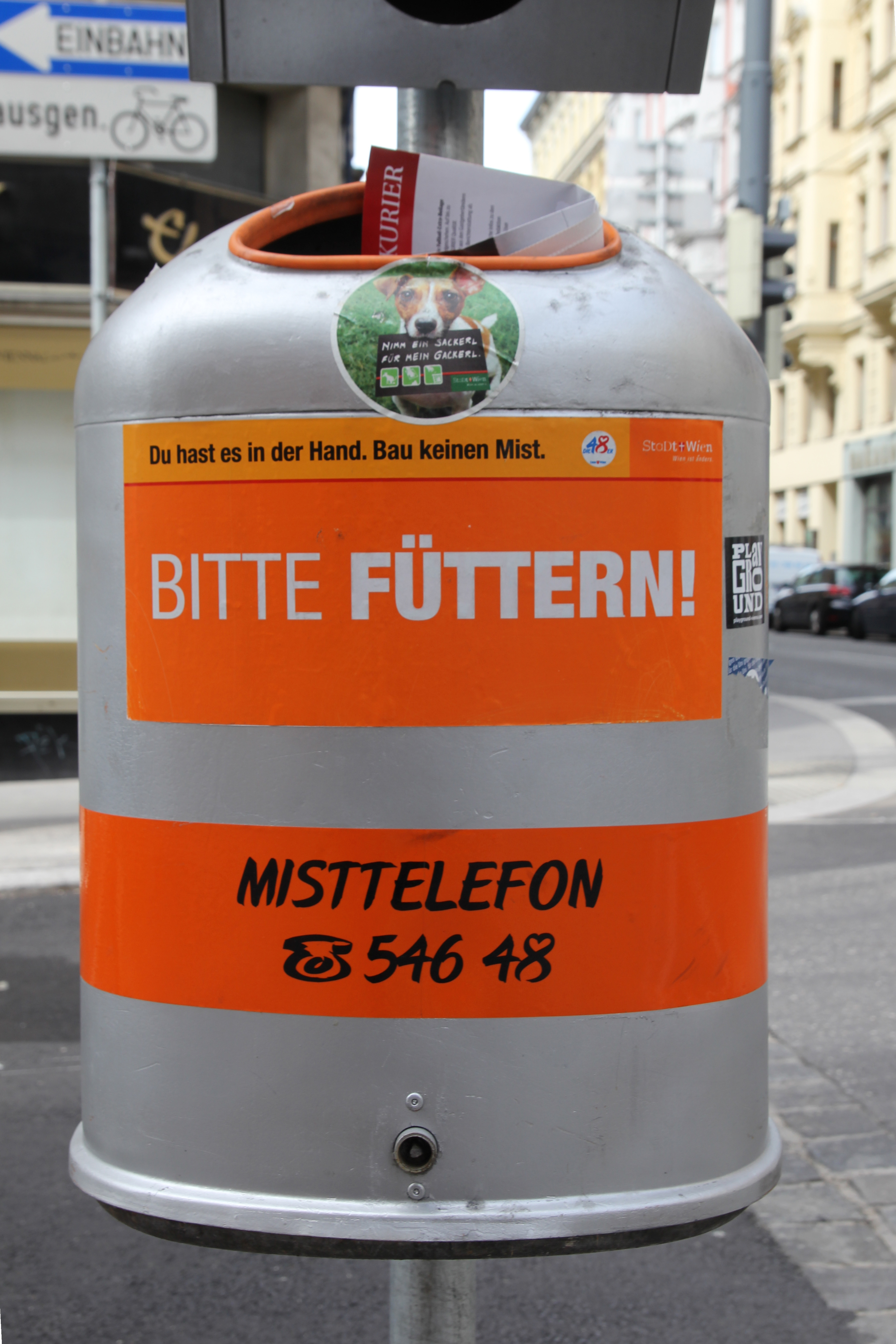 Mistkübel in Wien. Bitte Füttern!